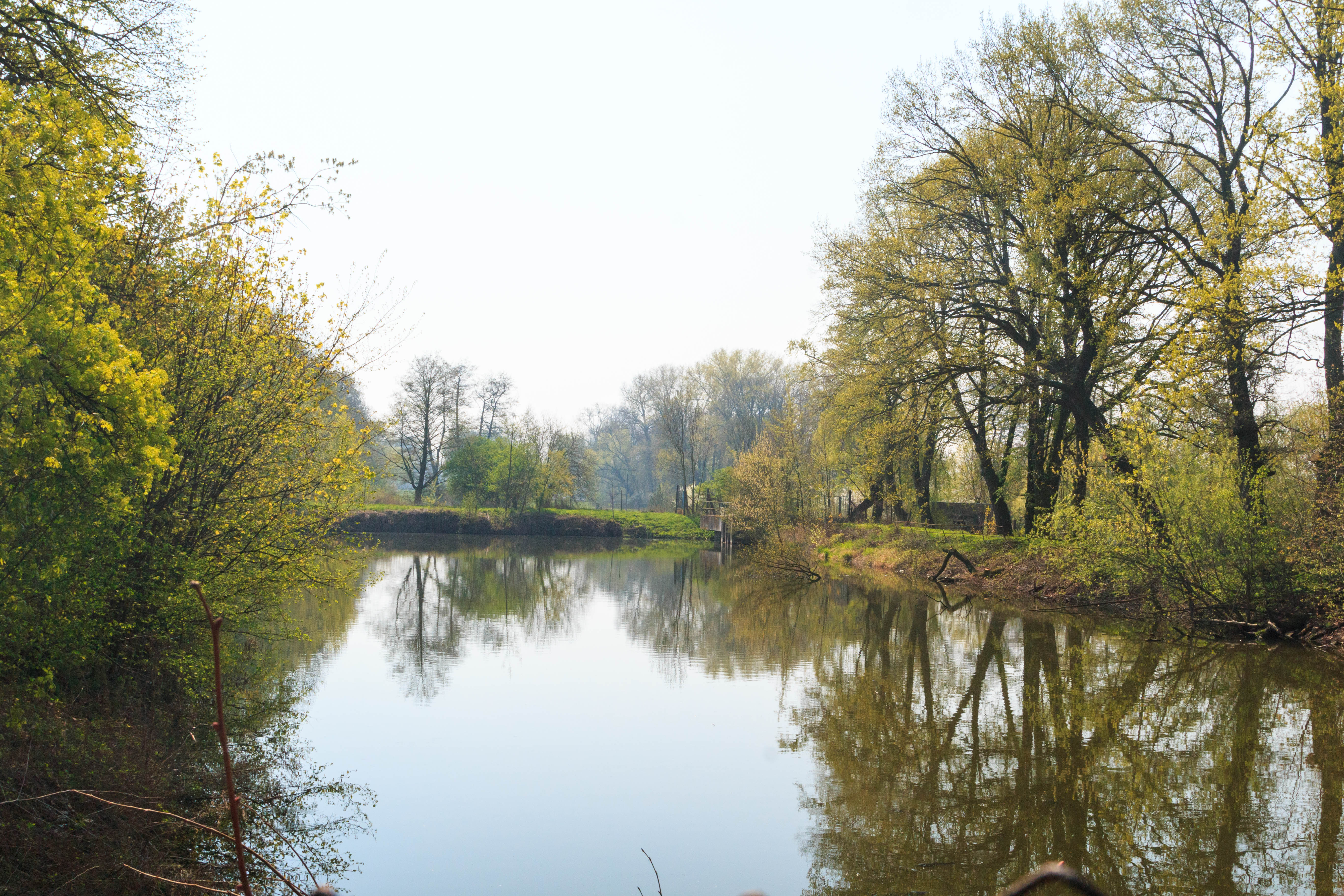 Třebosický rybník Project: Vodstvo.